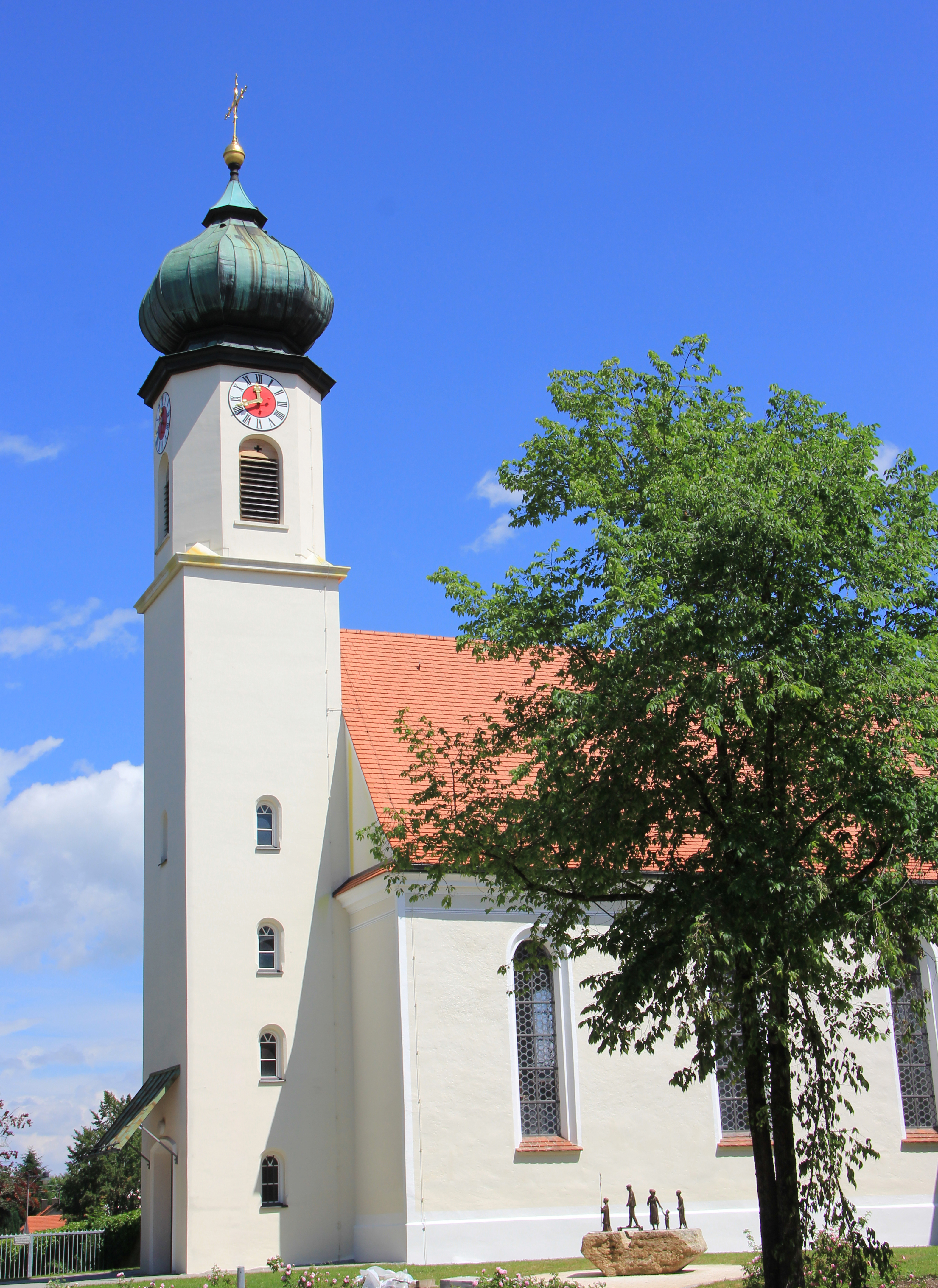 Die neu renovierte Wallfahrtskapelle "Maria unter der Egg" in PeitingThis is a photograph of an architectural monument.